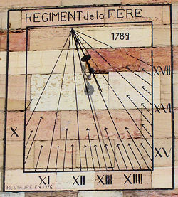 Cadran solaire avec marque "Régiment de La Fère" apposé sur le mur du Pavillon Royal des casernes quartier Bonaparte, Auxonne, Côte-d'Or, Bourgogne, France.